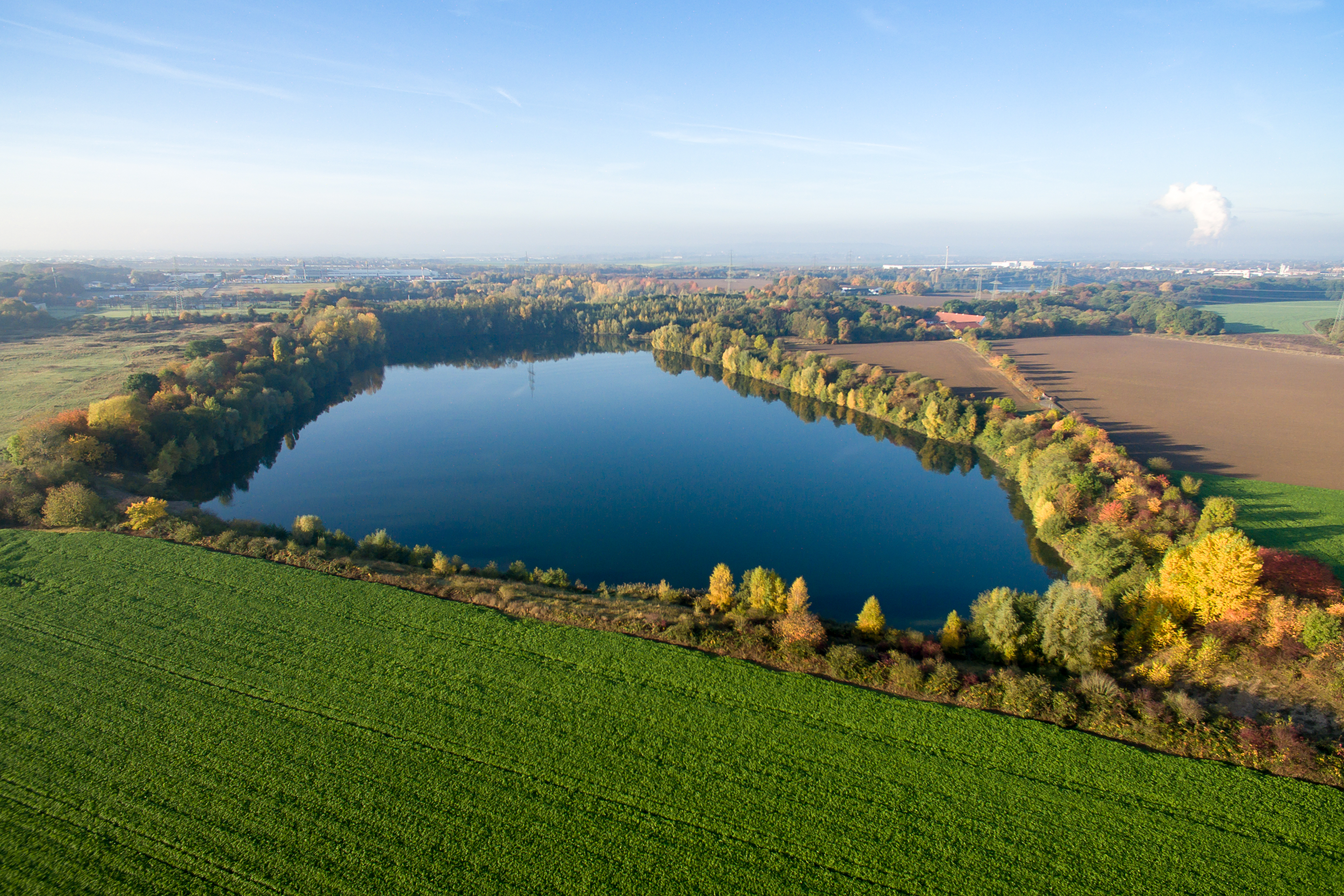 Stöckheimer See in Köln-Bocklemünd